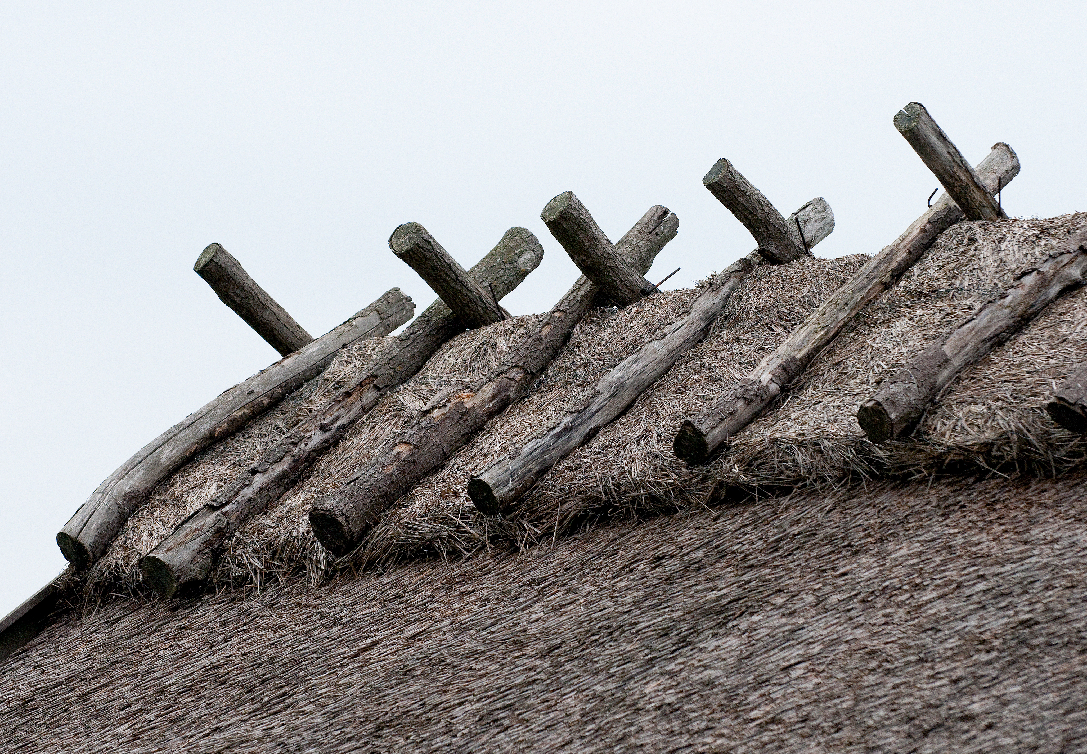 Detalj av vasstak/stråtak på Öland